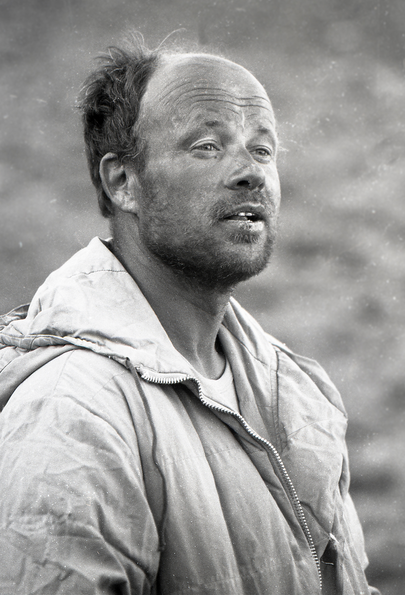 Risto Tanner